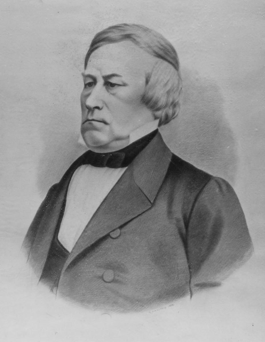 Porträtt föreställande A. W. Frestadius, målat i svartkrita 1868 av Thomas Svaneskog